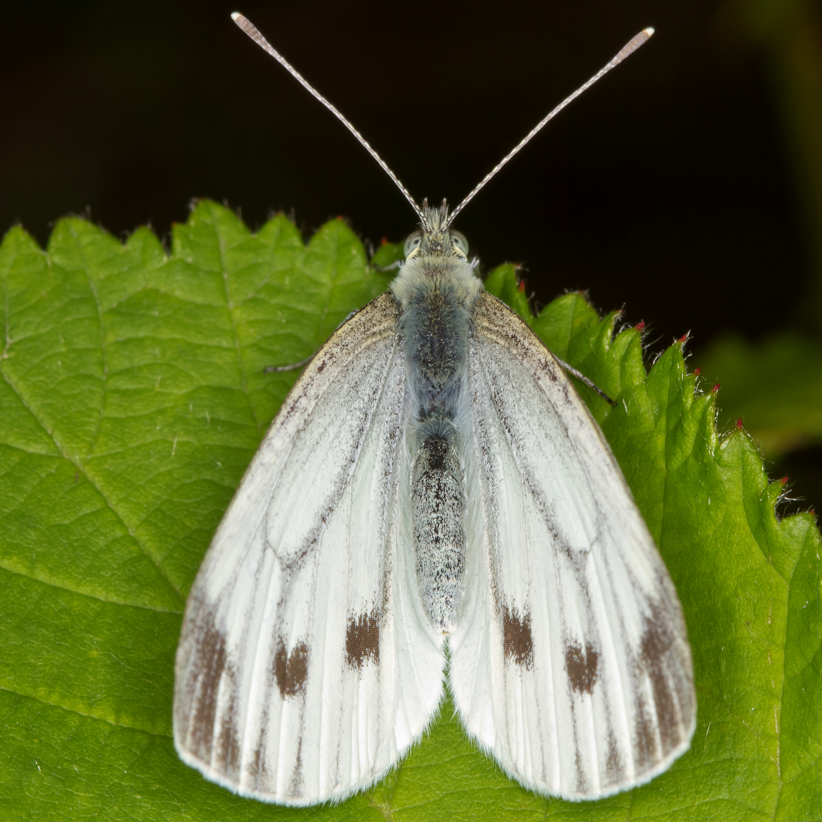 Sachsen, Garten: Rapsweißling